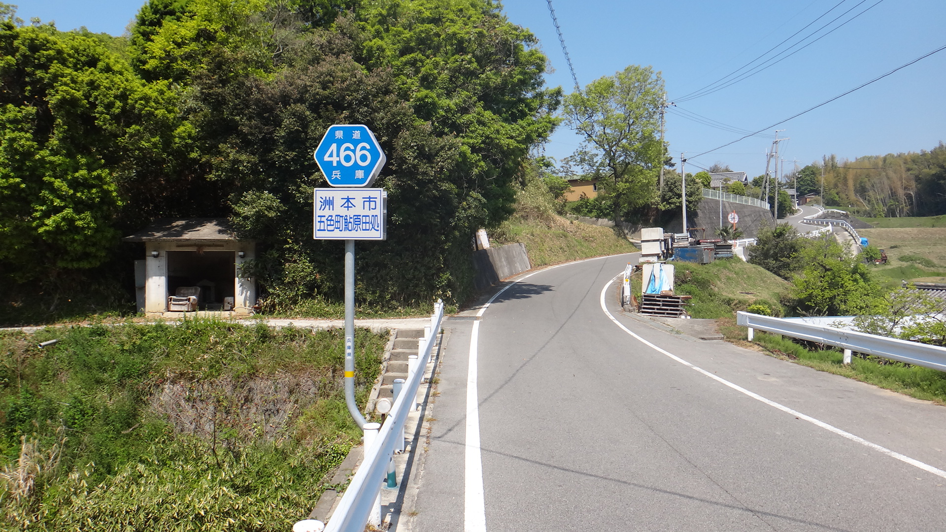 兵庫県道466号洲本市五色町鮎原田処